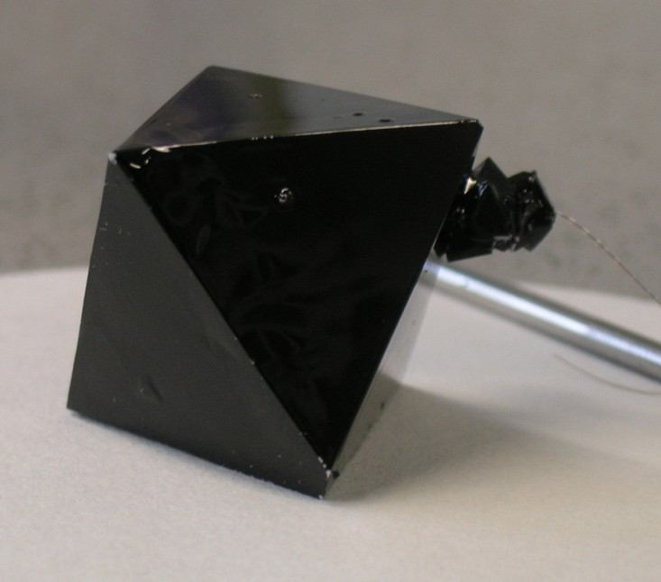 Kaliumchromalaun Oktaeder, 2,5 cm Kantenlänge